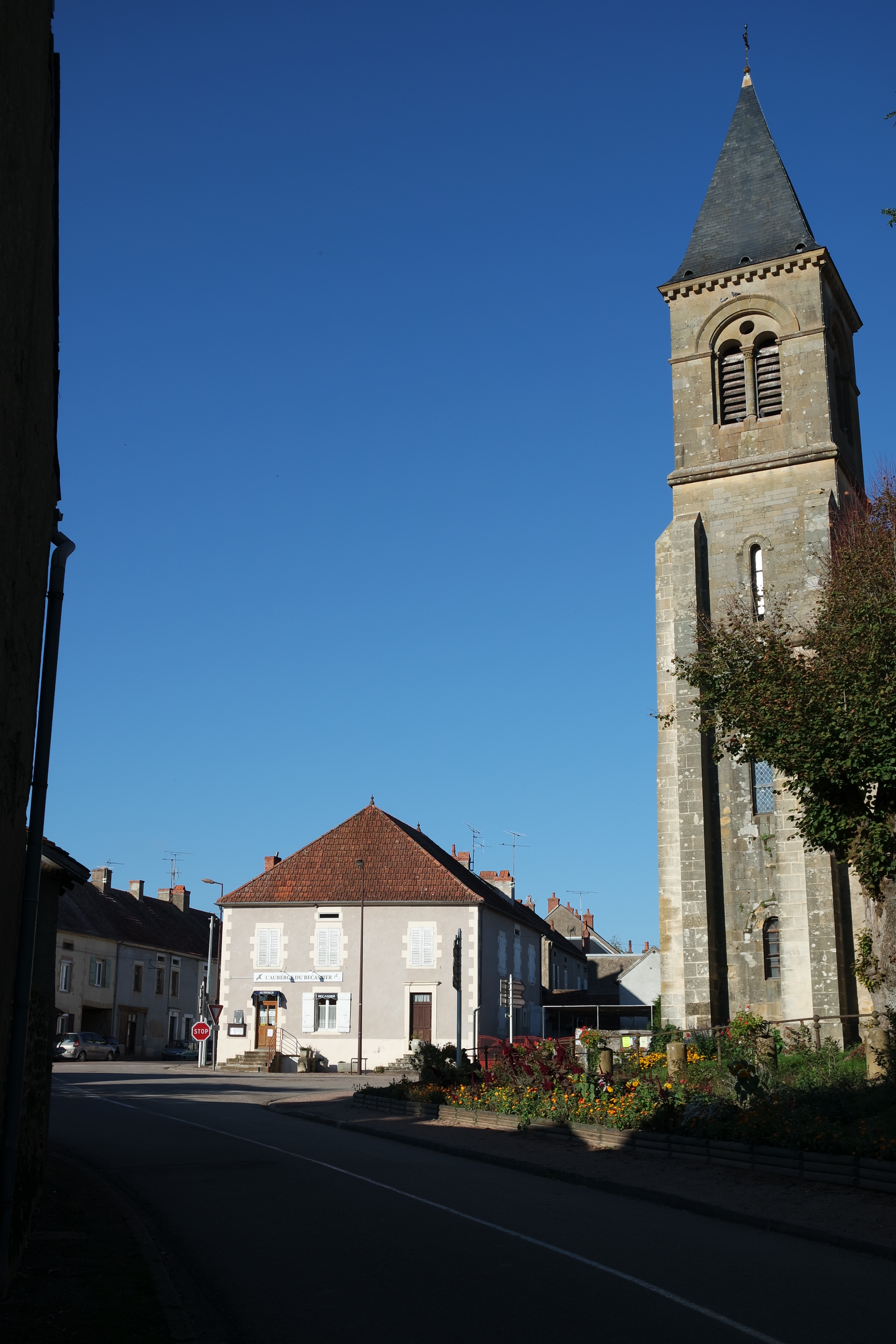 Vandenesse, Nièvre, France.